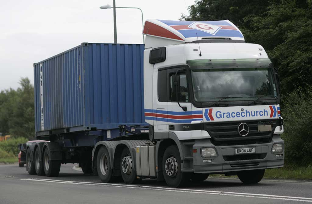 GRACECHURCH